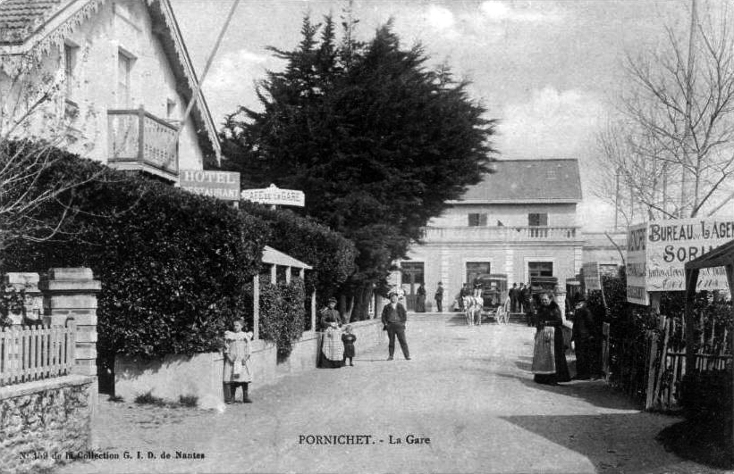 En arrière plan l'entrée du bâtiment voyageurs de la gare de Pornichet (vers 1900).